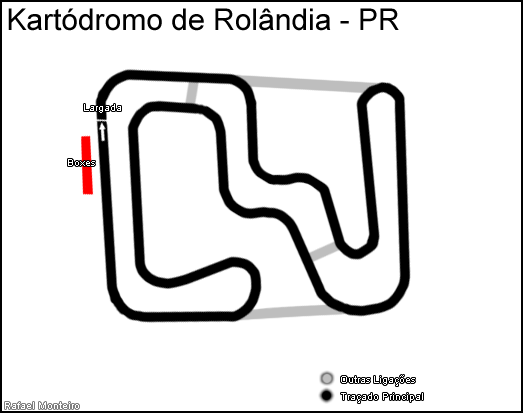 Desenho do traçado total do Kartódromo de Rolândia